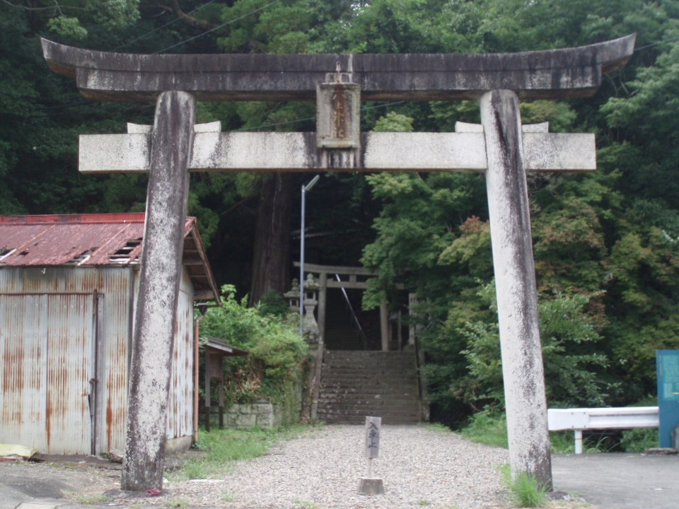 八上神社の鳥居